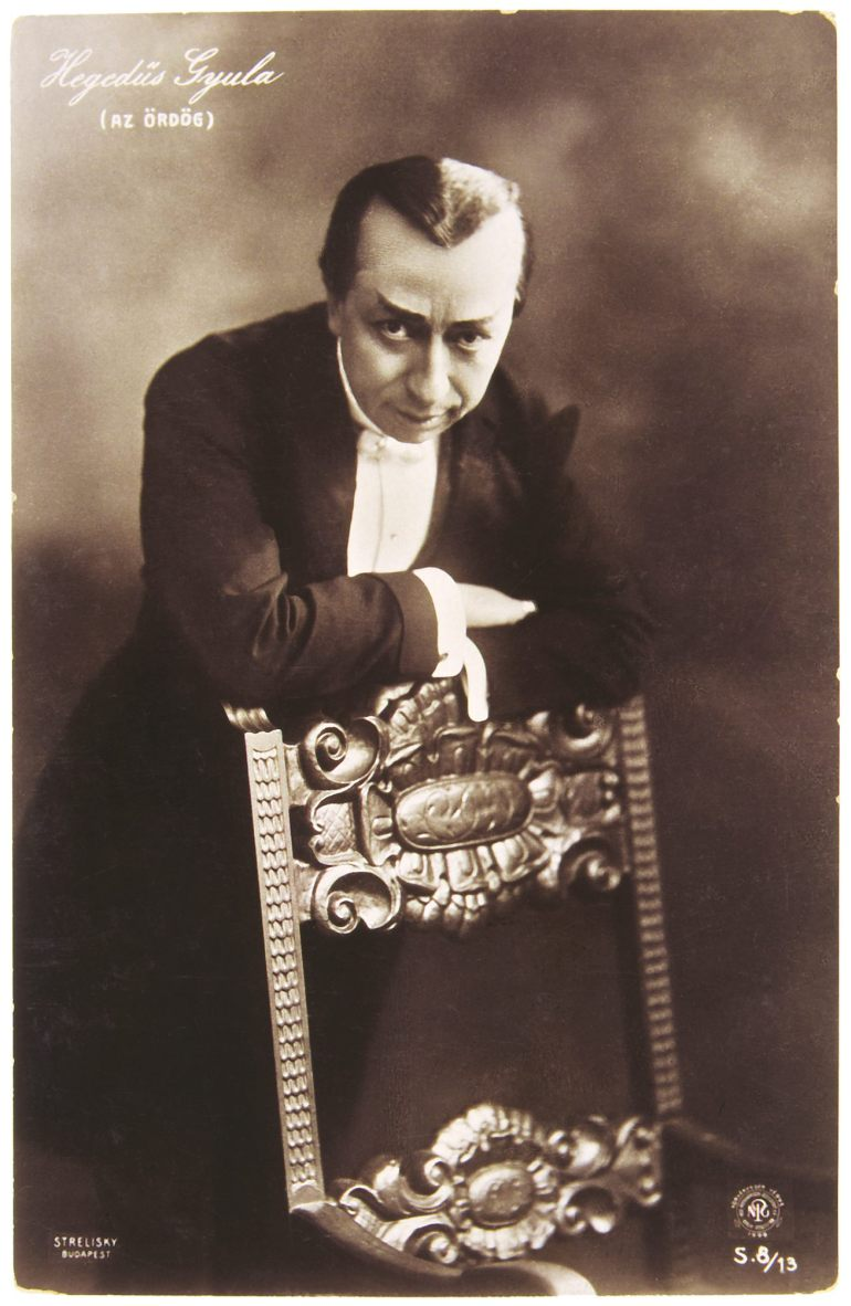 Hegedűs Gyula Az ördög című előadás főszerepében, 1907.